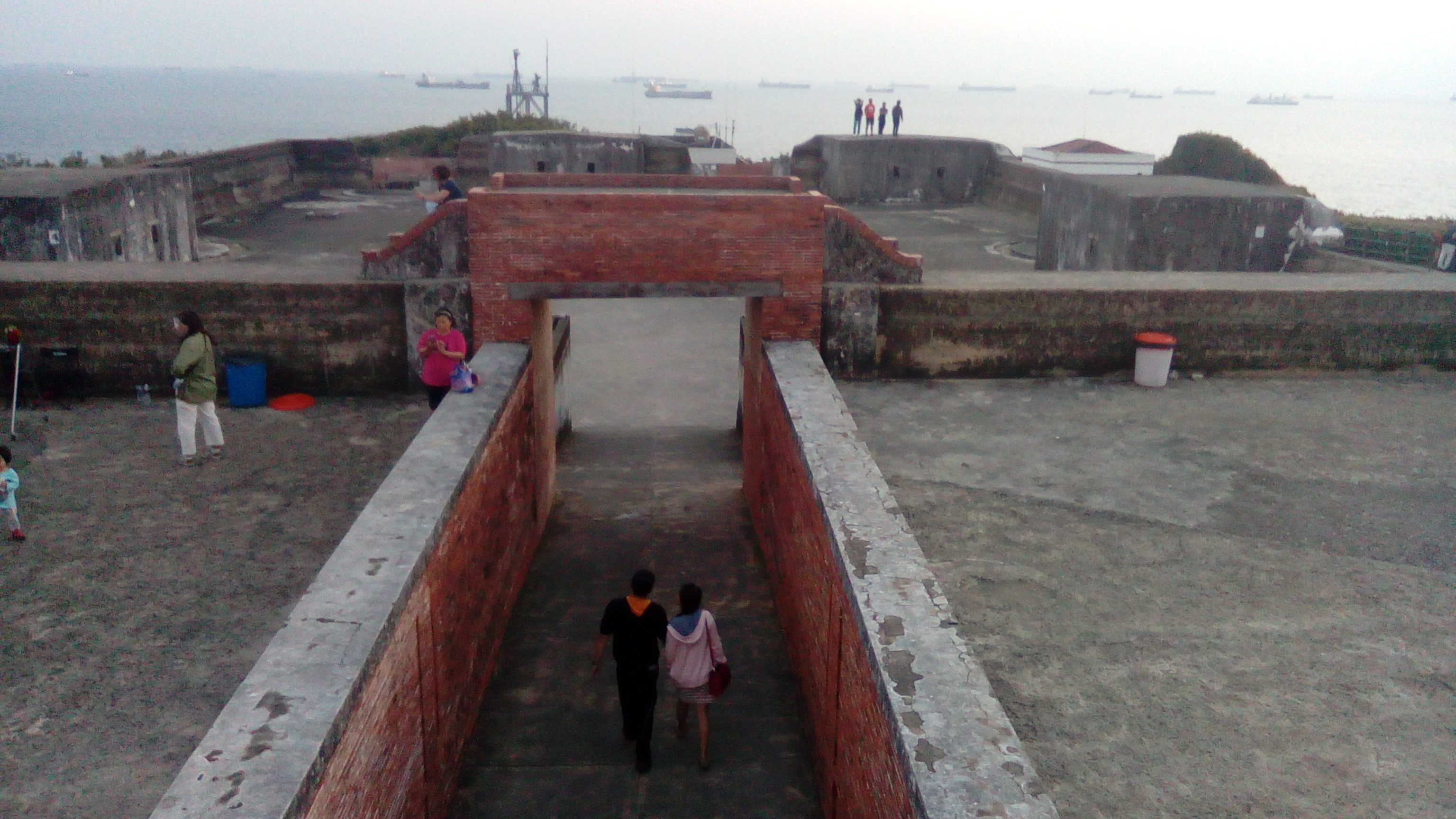 位於旗津區最北側的旗后山頂 砲台主體已拆除 僅留下城牆及基座